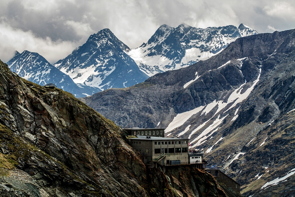 Gamsgrubenweg zur Kaiser-Franz-Josefs-Höhe, im Hintergrund der Nordostteil der Schobergruppe um den Karlkamp (3114 m ü. A.)